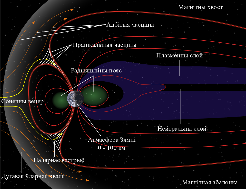 Структура магнітнага поля Зямлі